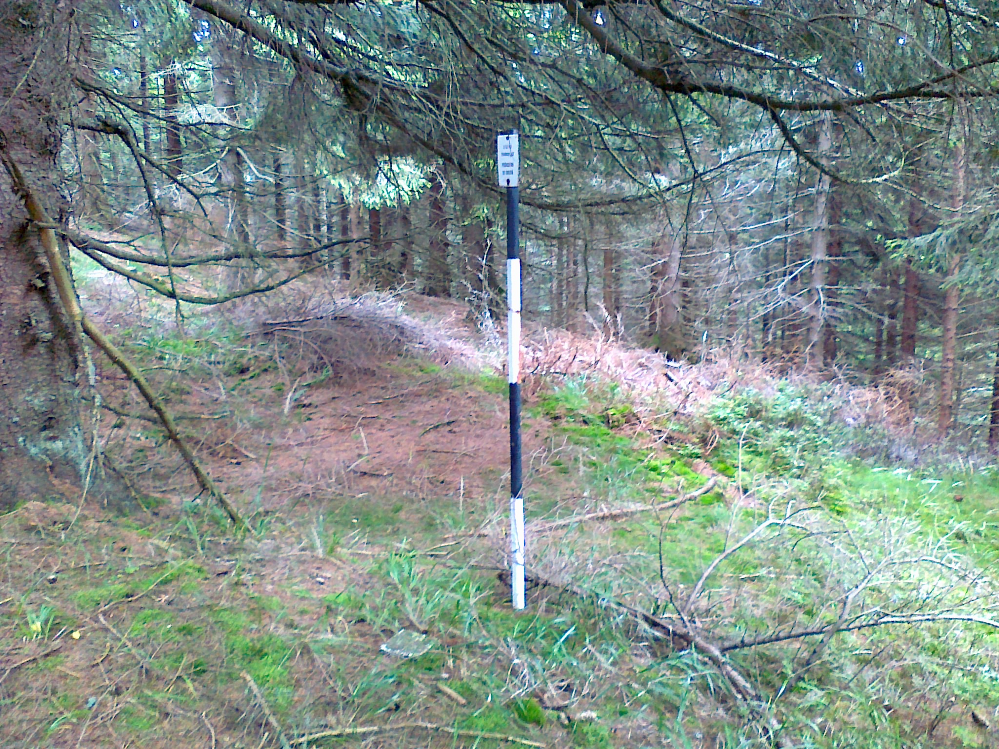 Punkt geodezyjny na górze Nad Petrovkou - 1051 m n.p.m.